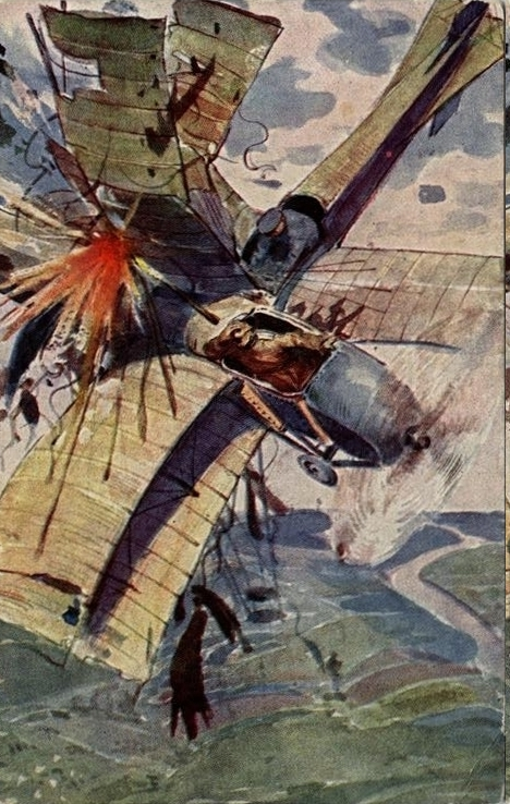 Почтовая карточка «Подвиг русского лётчика Нестерова».